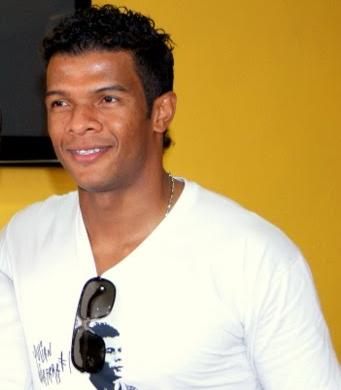 Viáfara photo